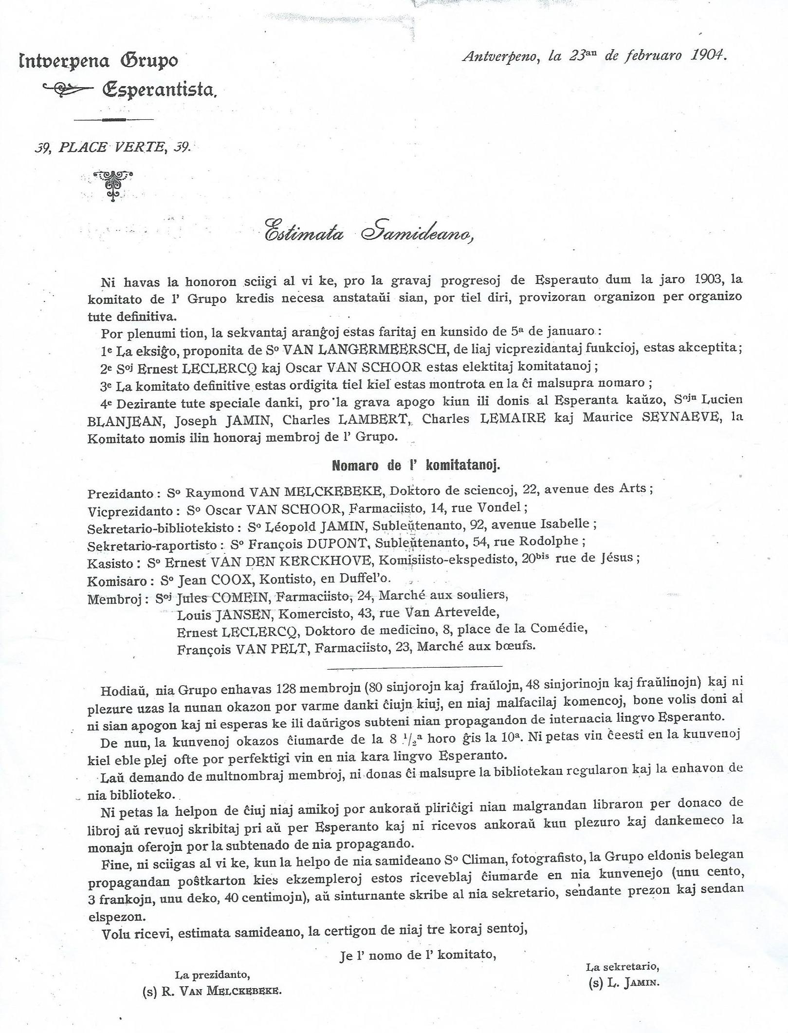 Antverpena Grupo Esperantista